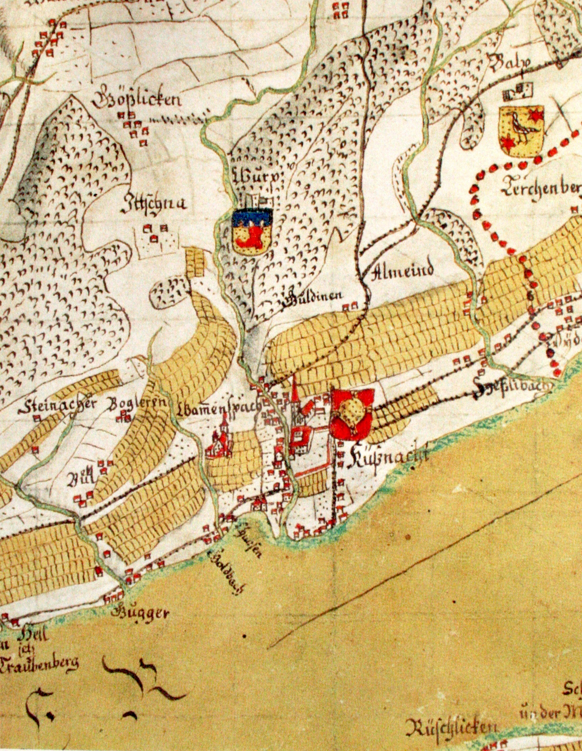 Küsnacht auf einer Neuzeichnung des Gygerplans von 1667 aus dem 18. Jahrhundert